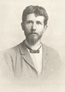 Josef Kalus (1855 - 1934), Český básník, spisovatel a učitel.